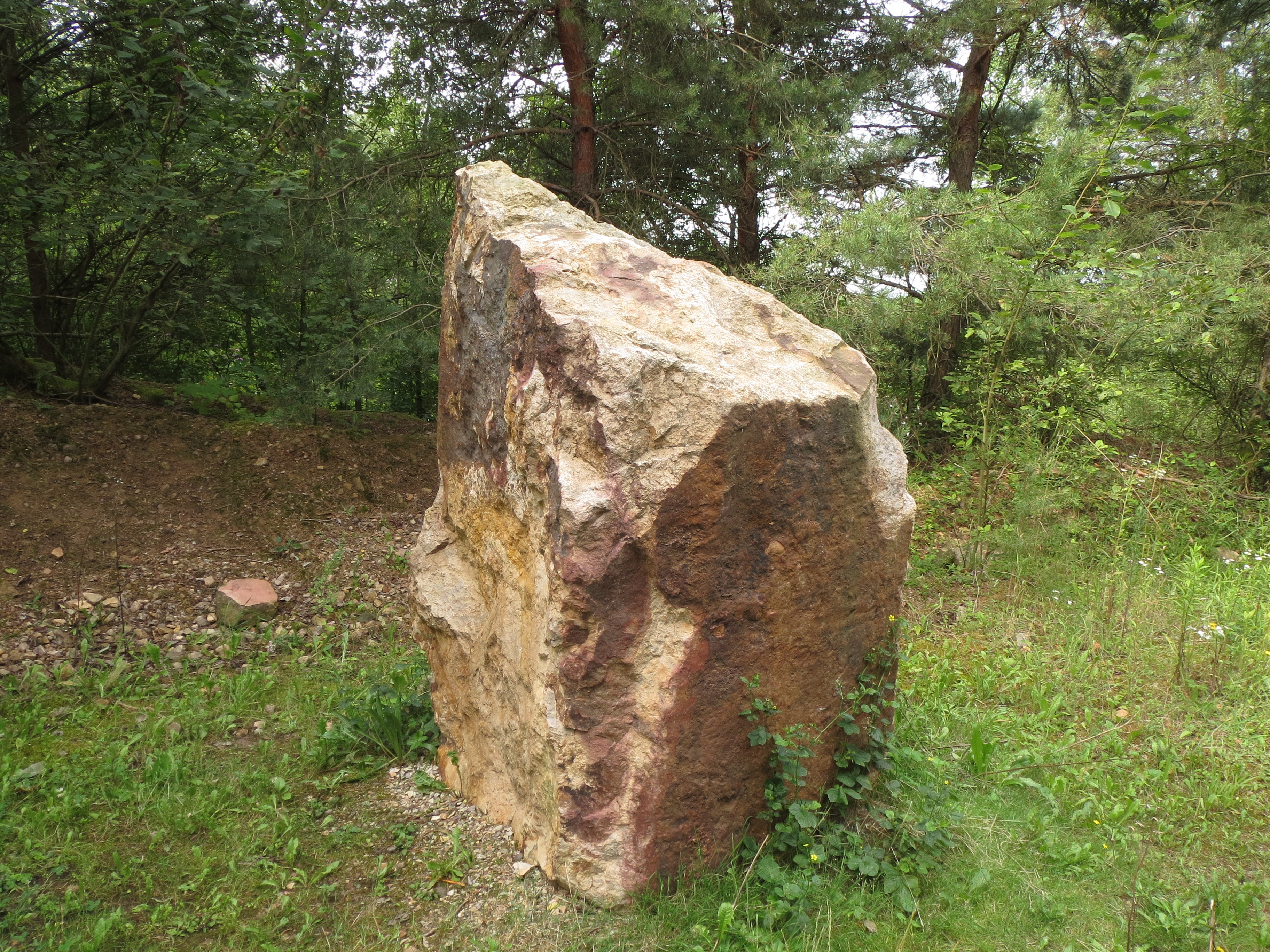 Ein ausgestellter Porphyrbrocken im Steinbruch Leferenz (an der zweiten Kurve, von unten)